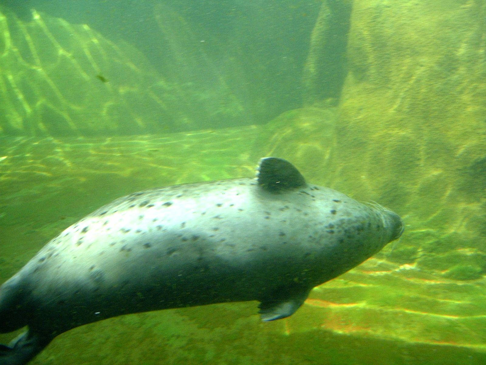 Phoca vitulina at Budapest Zoo